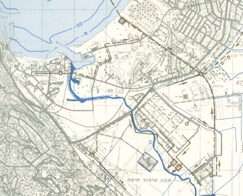 אגן נחל הקישון